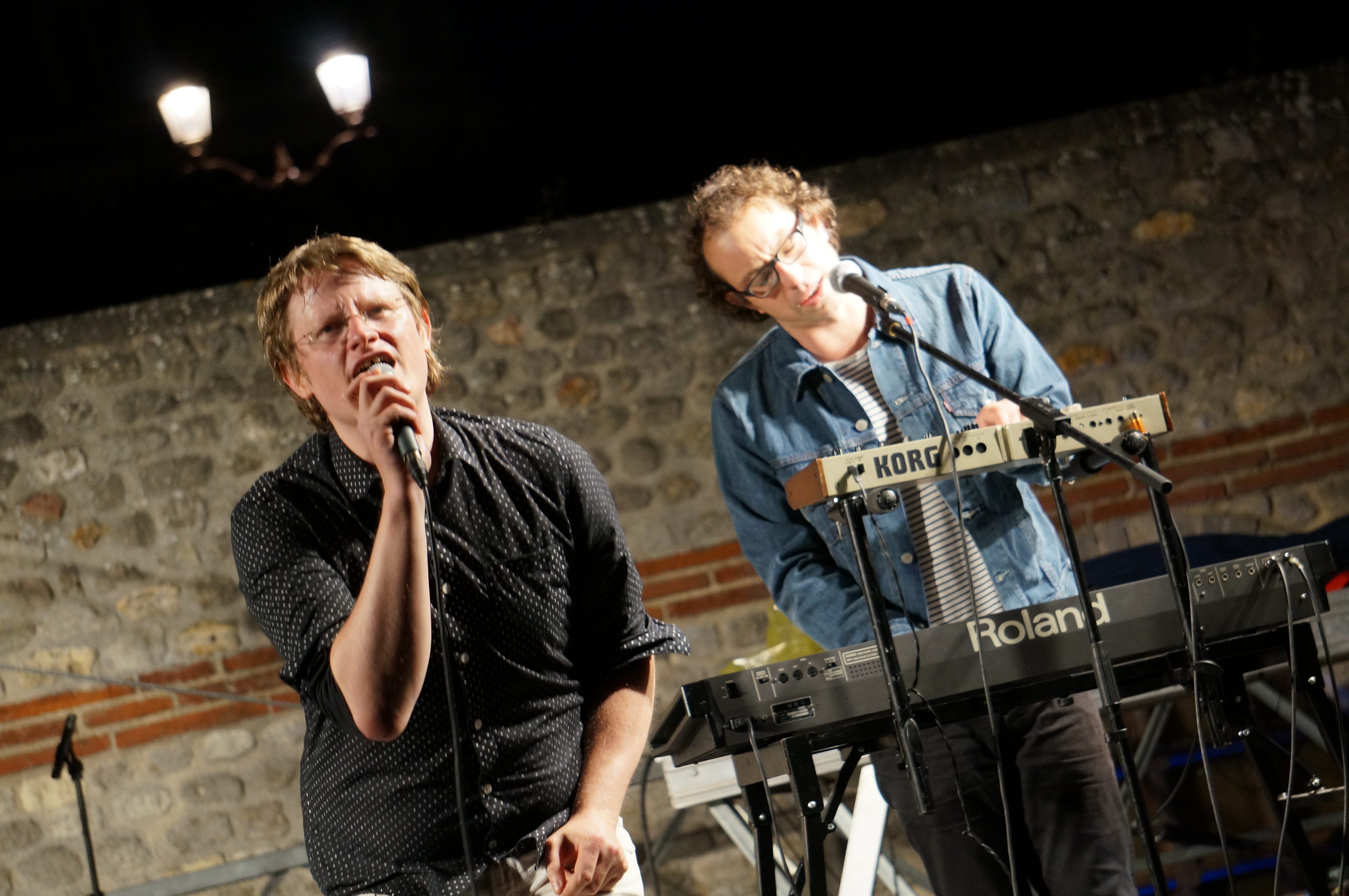 concert de cloture d'"Un été à Reims de 2013" dans le projet "Bats brigade".